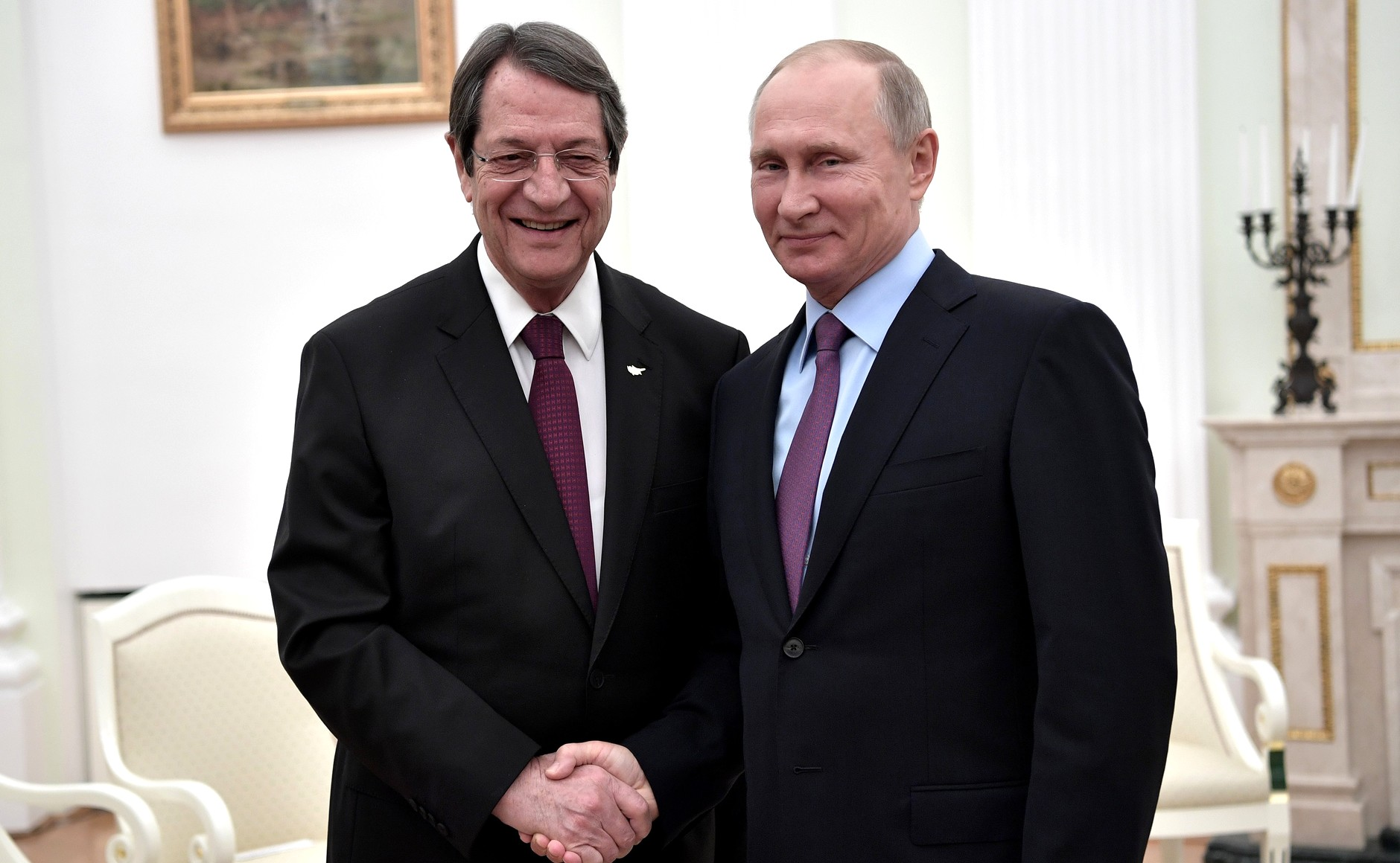 Президент России Владимир Путин с Президентом Республики Кипр Никосом Анастасиадисом